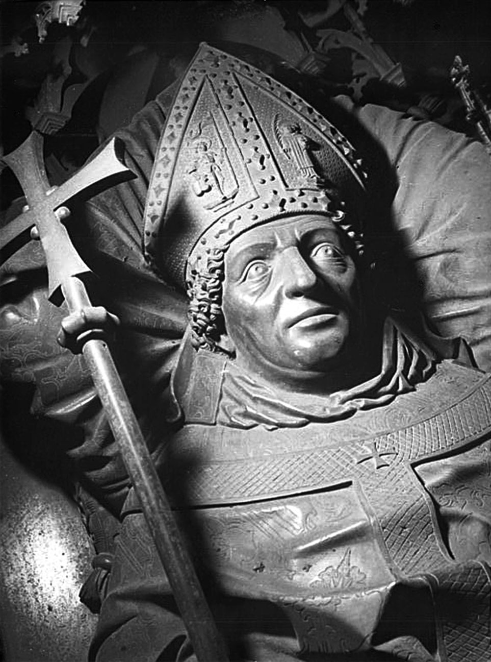 Zentralbild-Biscan Wjt-Ho. 7 Motive 19.9.1955 Der Dom zu Magdeburg zur Nutzung freigegeben Der in jahrelanger Arbeit wiederhergestellte Dom zu Magdeburg ist am 15.9. von der Baupolizei abgenommen und zur Nutzung freigegeben worden. Die feierliche Eröffnung des Doms ist für 22. September geplant und soll gleichzeitig mit der Einführung des neuen Bischofs Jänicke vorgenommen werden. Die Wiederherstellung des knapp vor Kriegsende von amerikanischen Bomben schwer zerstörten Doms hat über eine Million DM gekostet und wurde ausschliesslich aus den Staatsmitteln bestritten. Auch nach der Freigabe zur Nutzung sind viele kleinere Kriegsschäden zu beheben. UBz, Die Erzplastik des letzten katholischen Bischofs von Magdeburg, des Bischofs Ernst von Sachsen, ist ein Werk des Nürnberger Erzgiessers Peter Vischer d. Ä.